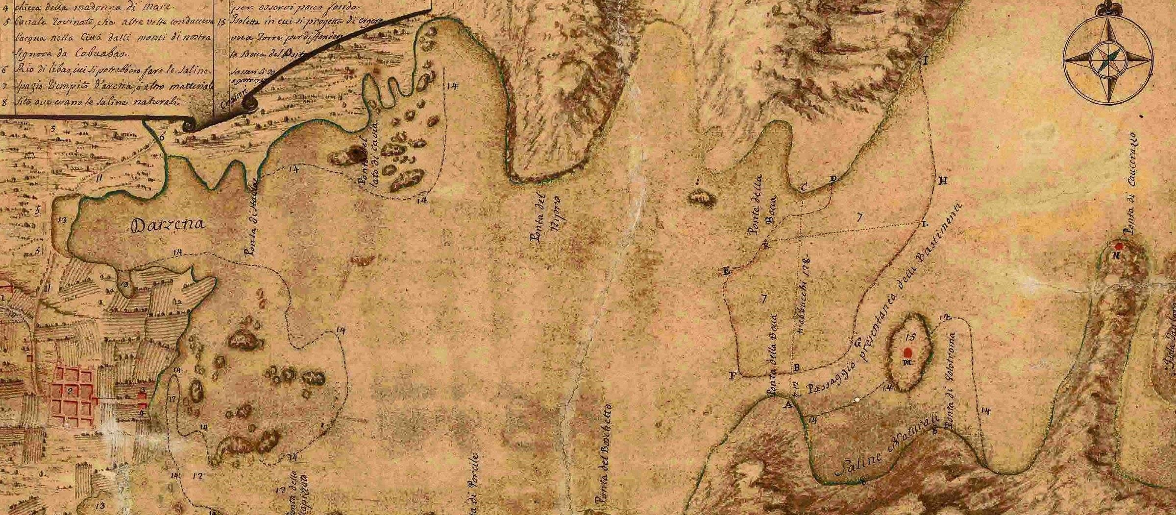 Golfo di Olbia, disegno del XVIII secolo del Craveri